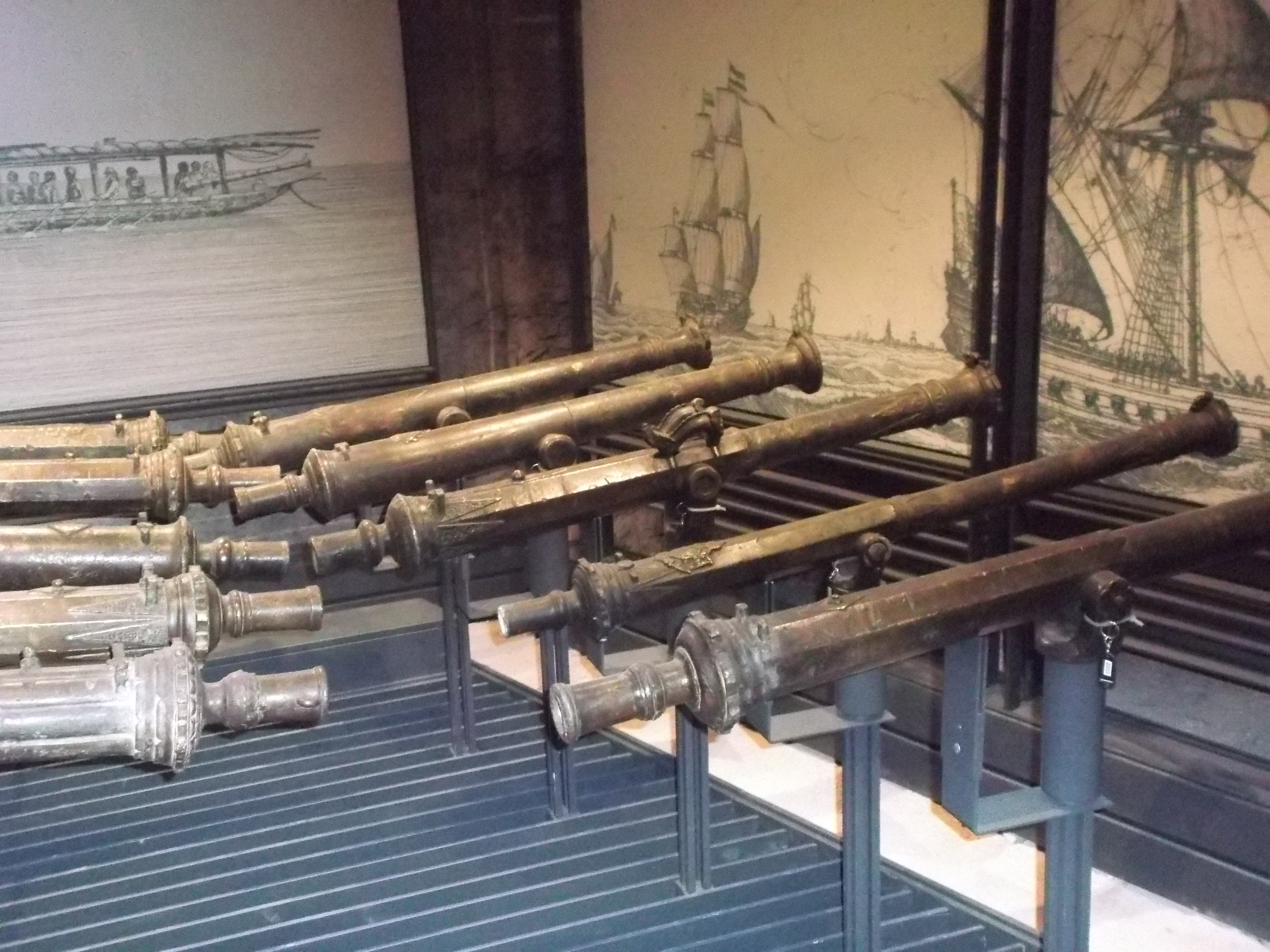 Lantakas